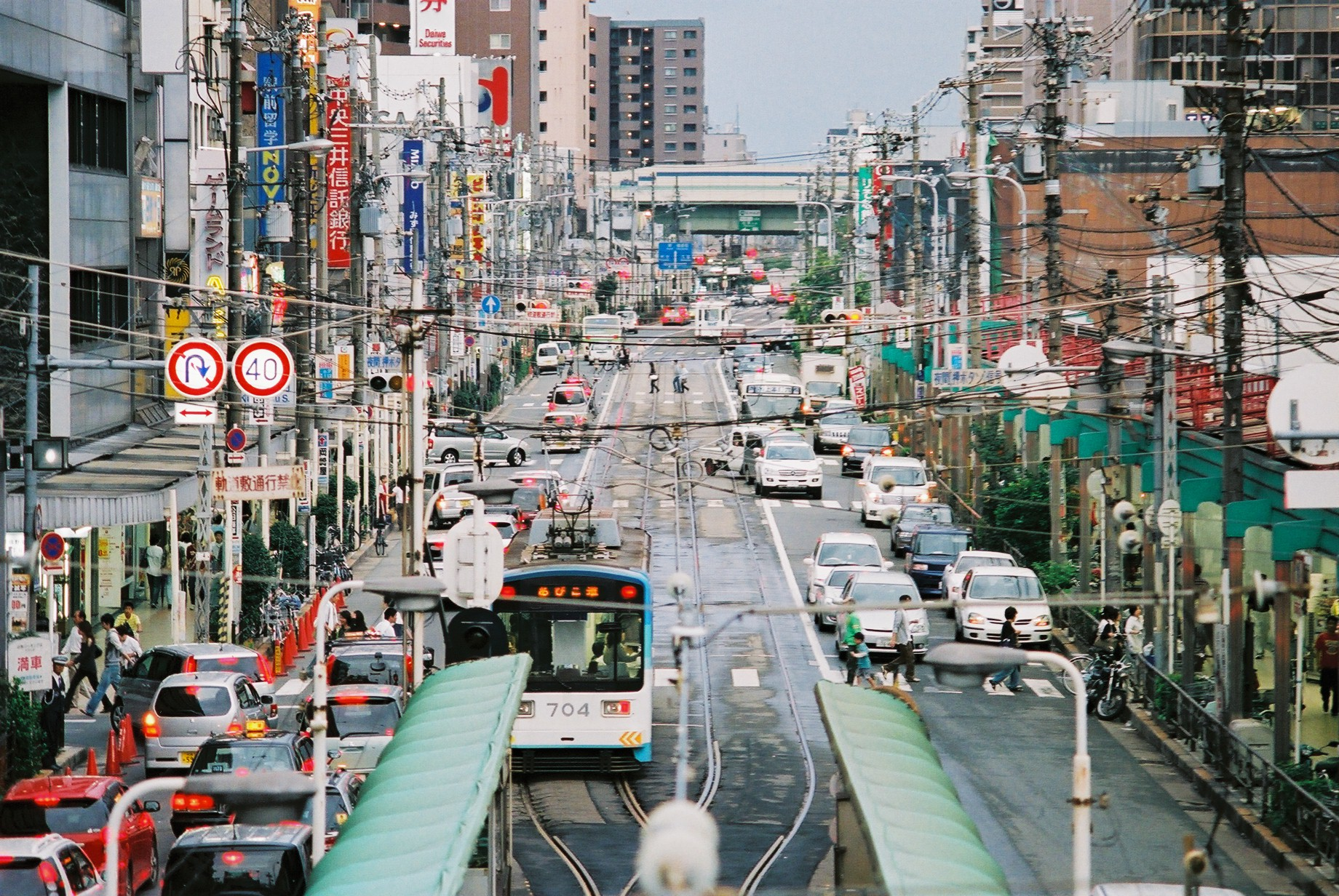 大阪府大阪市阿倍野区、あべの筋、近鉄前交叉点より南を望む。